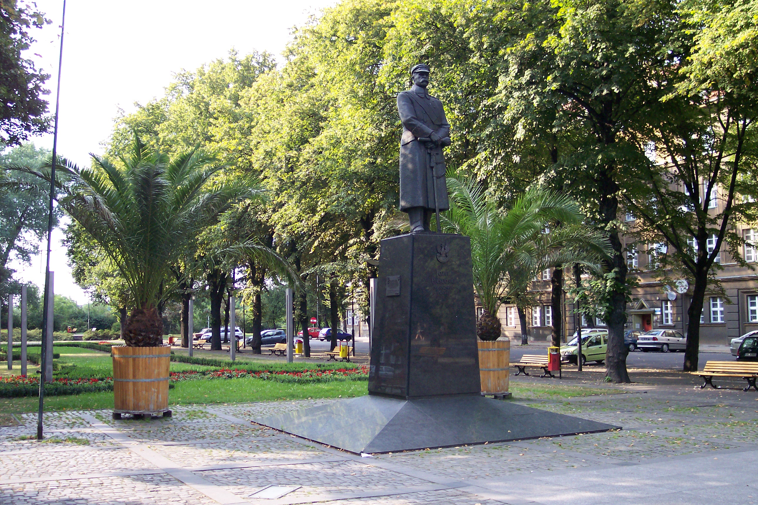 Pomnik Piłsudskiego w Gliwicach.